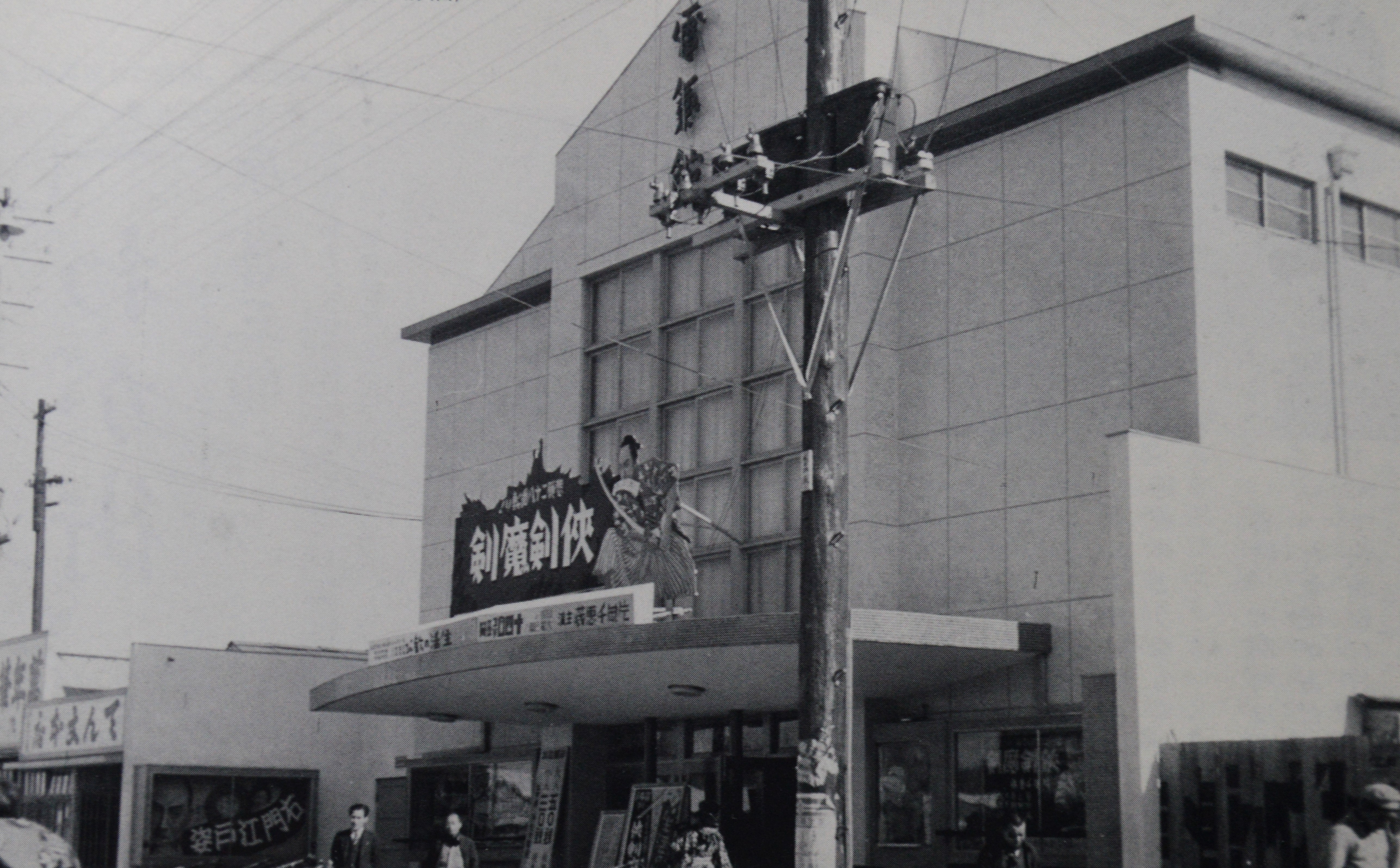 1940年の静岡大火後に再建された電気館。静岡市七間町。